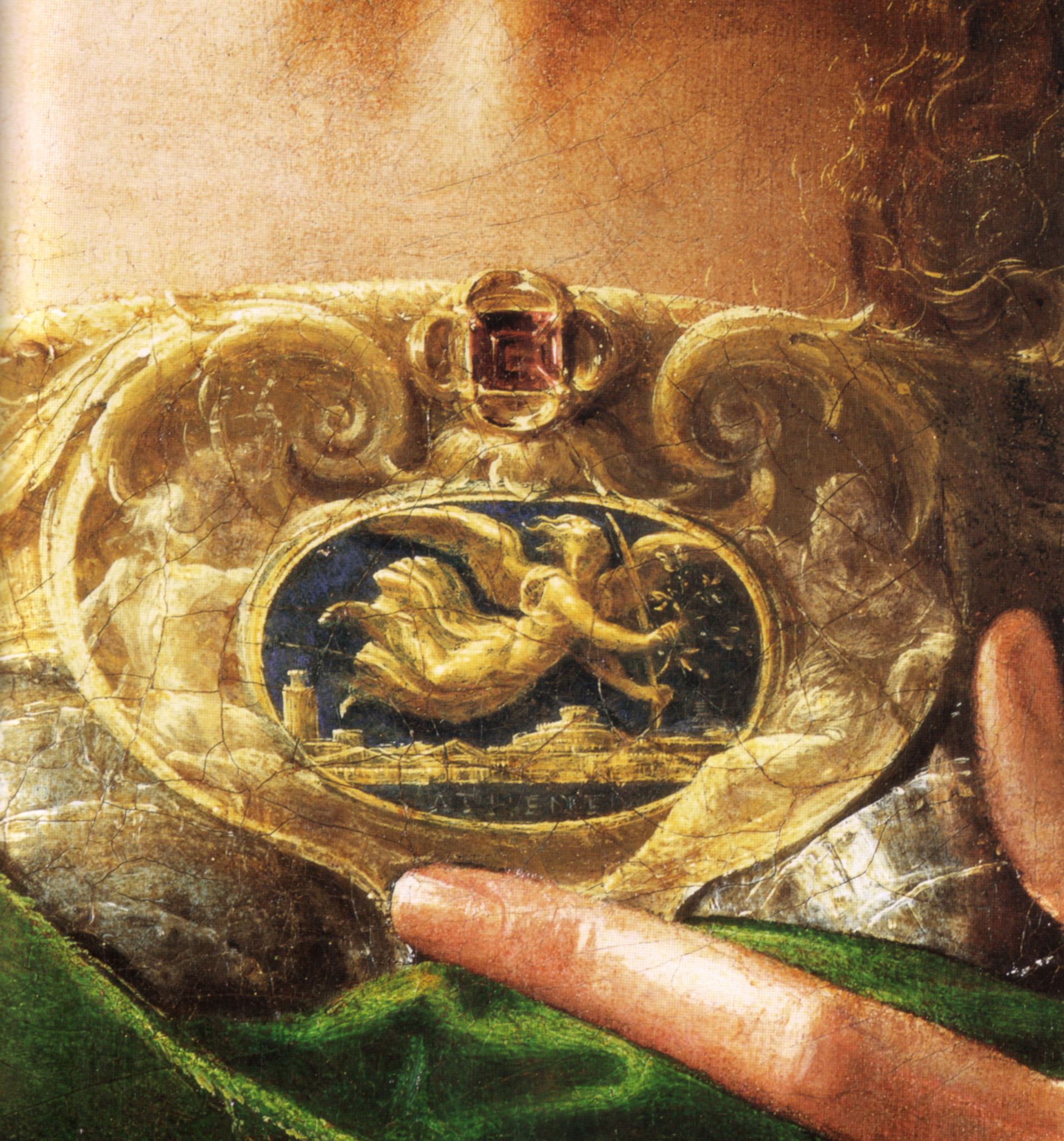 detail